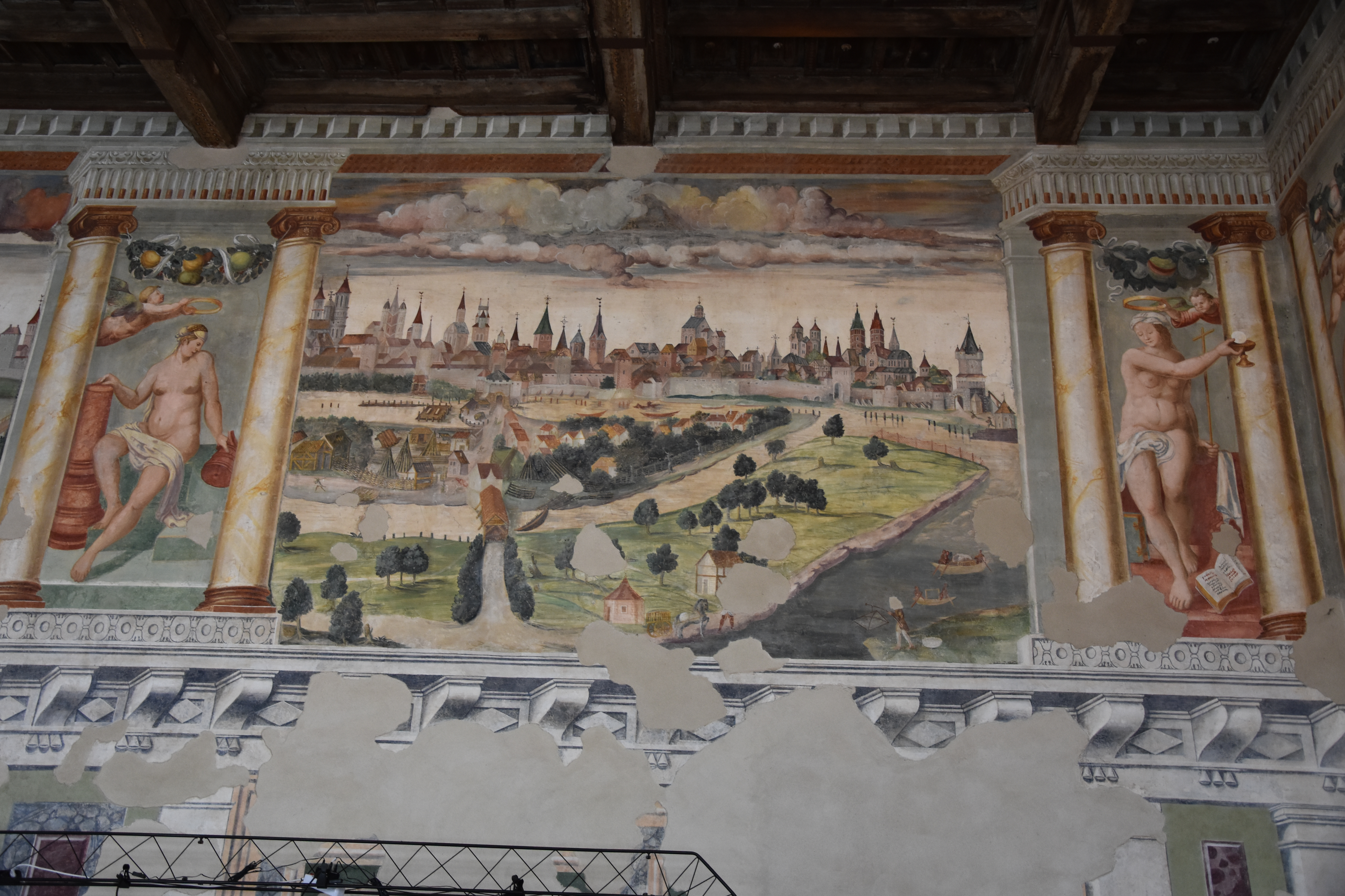 Castello di Melegnano, sala dell'imperatore, affreschi cinquecenteschi.